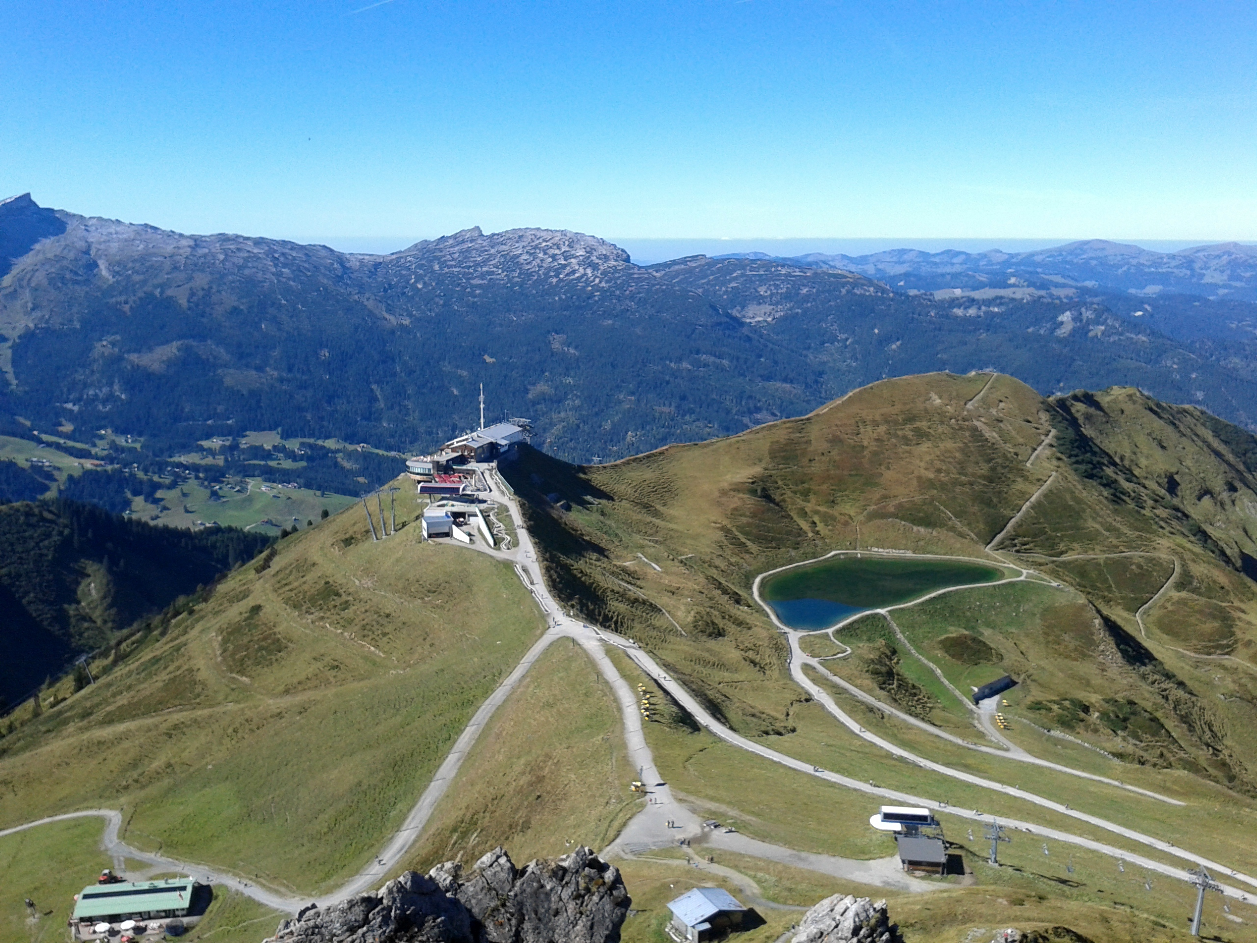 Kanzelwandbahn